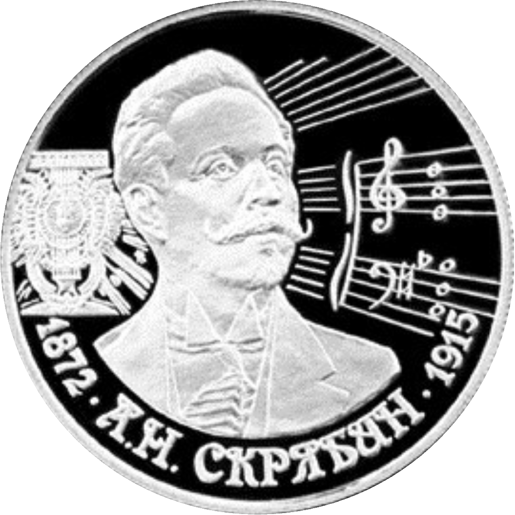 Монета Банка России — Серия: «Выдающиеся личности России», 125-летие со дня рождения А.Н. Скрябина, 2 рубля, реверс.